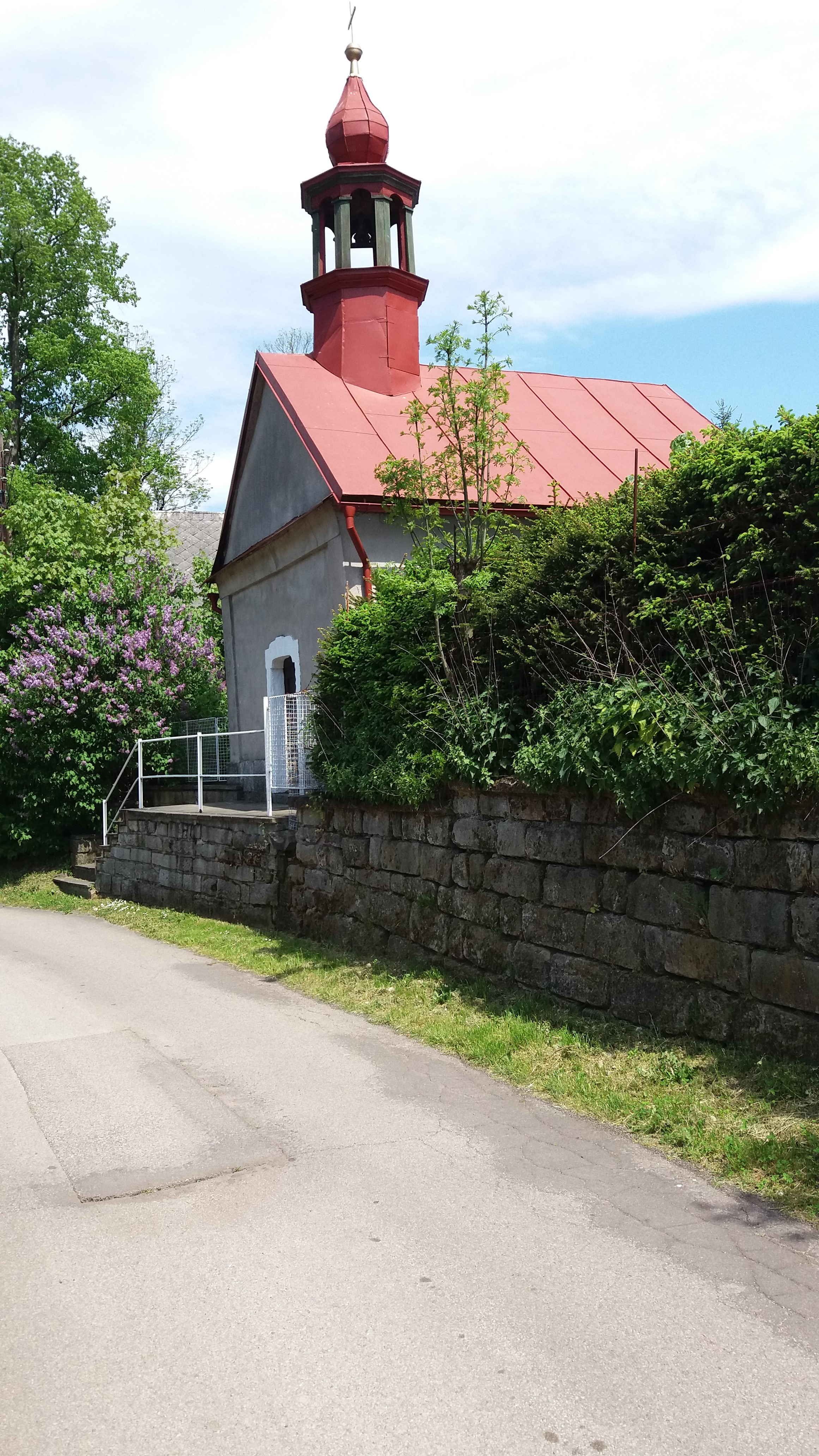 Kaple Panny Marie (Česká Metuje)